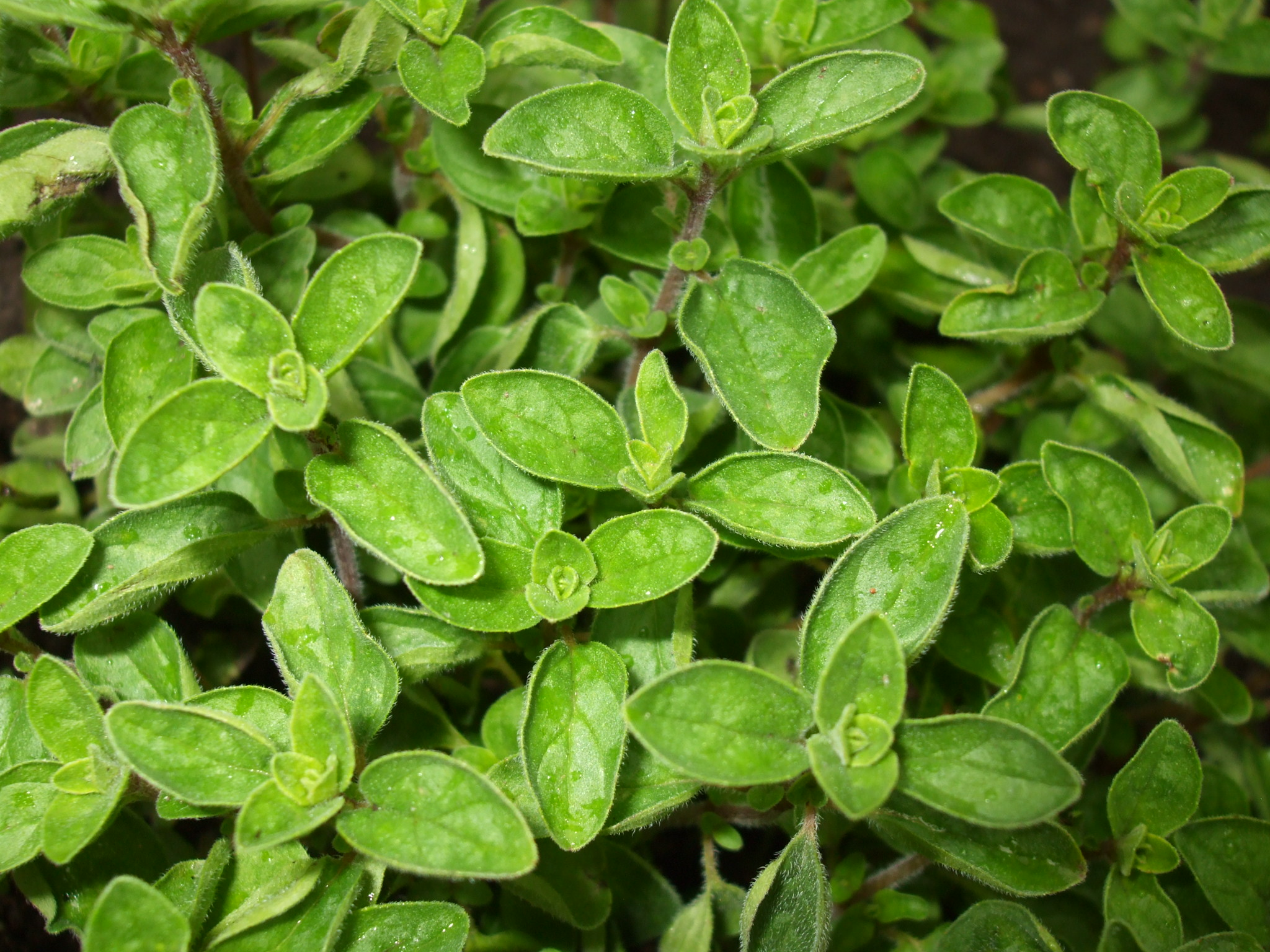 Oregano